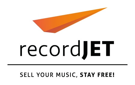 Das offizielle Logo von recordjet